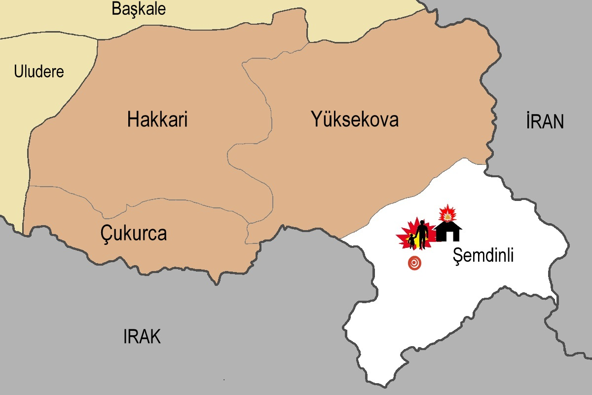 2016 Şemdinli saldırısını gösteren temsili harita.